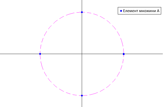 Зображення чотирьох точок на одиничному колі, які визначають множину "A", як приклад для роздрібнвання.